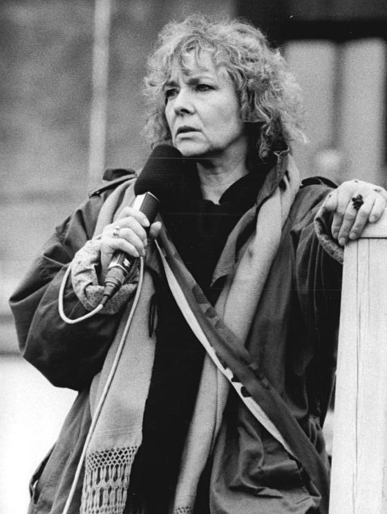 ADN-ZB Link 4.11.89 Berlin: Demonstration 500.000 Bürger beteiligten sich an einer Demonstration für den Inhalt der Artikel 27 und 28 der Verfassung der DDR. Auf dem anschließenden Meeting auf dem Alexanderplatz trug Annekathrin Bürger das Lied "Worte eines politischen Gefangenen an Stalin" für Walter Janka vor.